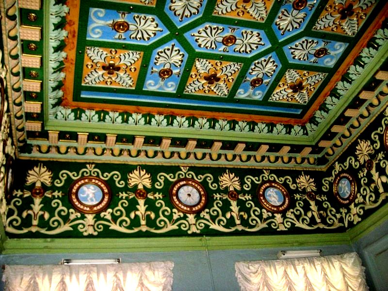 Інтэр'ер палаца ў Жылічах